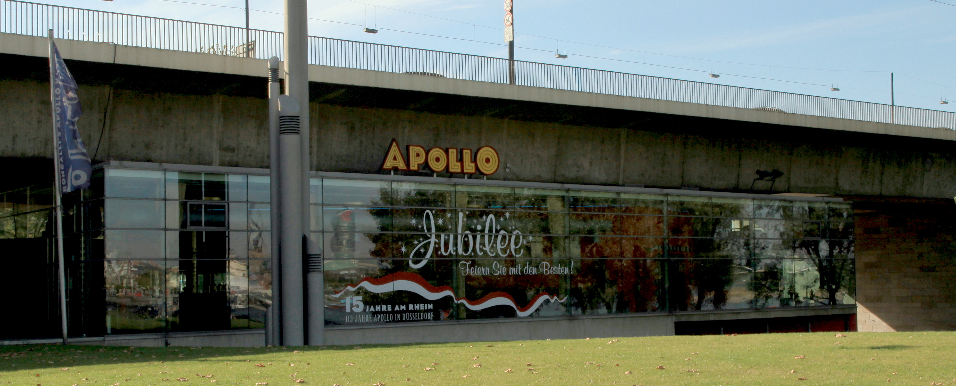 Apollo Varieté am Apollo-Platz unter der Rheinkniebrücke in Düsseldorf